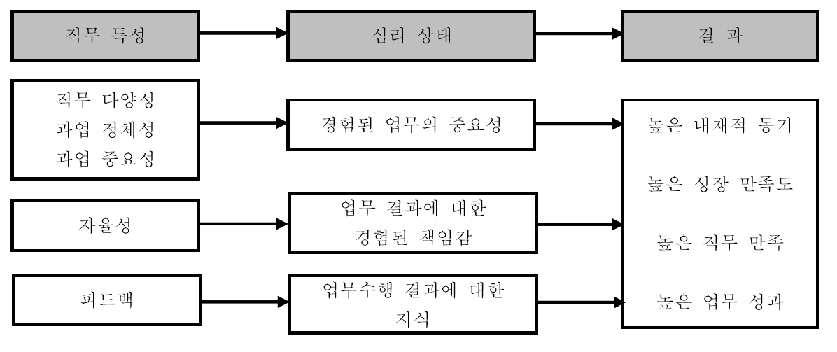 감정소진의 선행요인으로써 직무특성을 설명하는 모형이다.